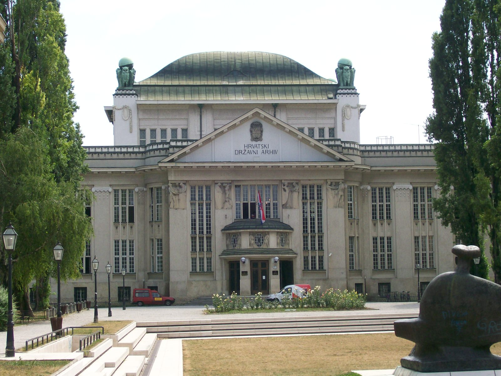 Zgrada Hrvatskog državnog arhiva u Zagrebu